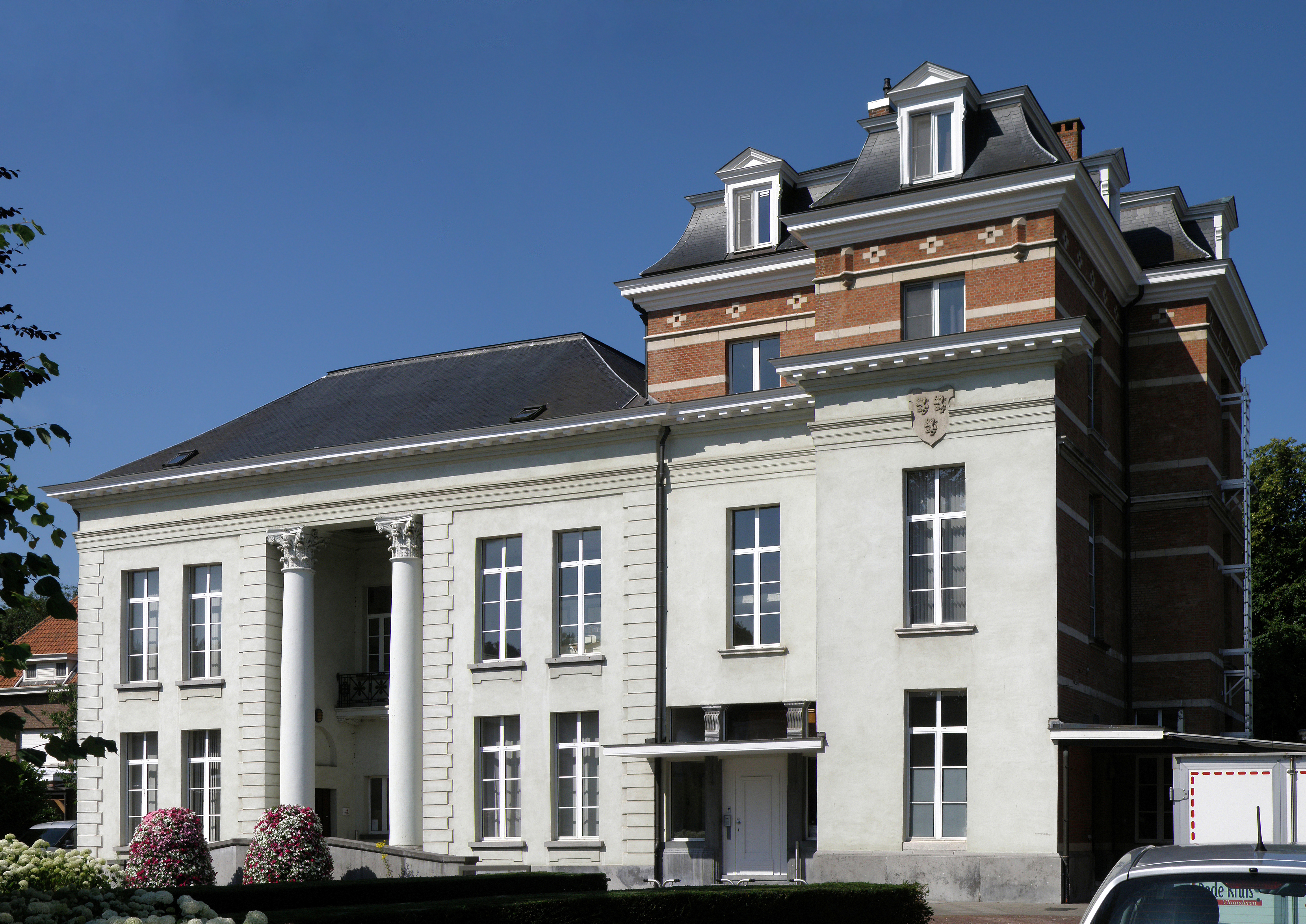 Antwerpen, district Hoboken (België). Kasteel Broydenborg, voorgevel (=oostgevel, aan de Broydenborglaan).